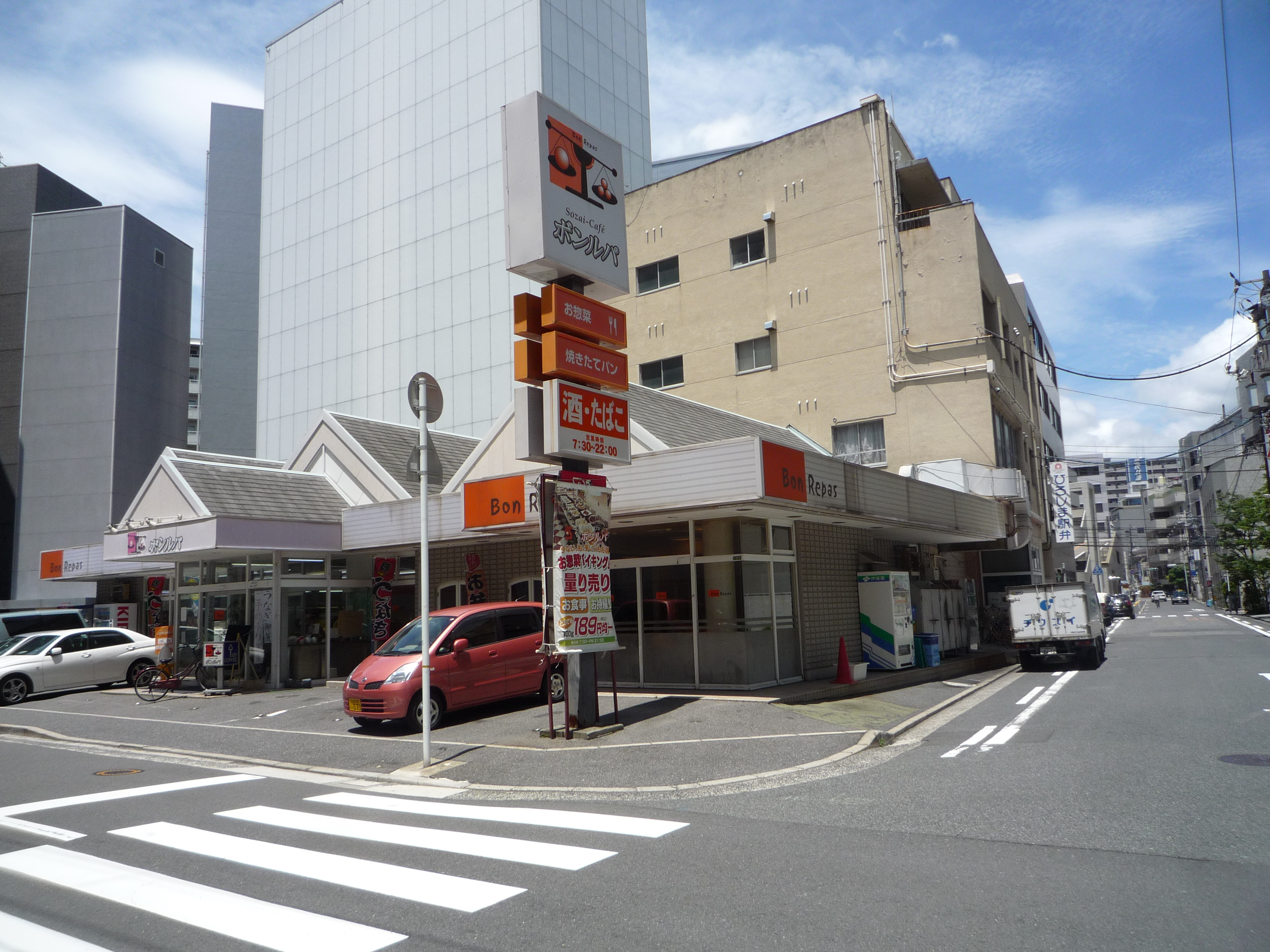 広島駅弁当 鉄道部